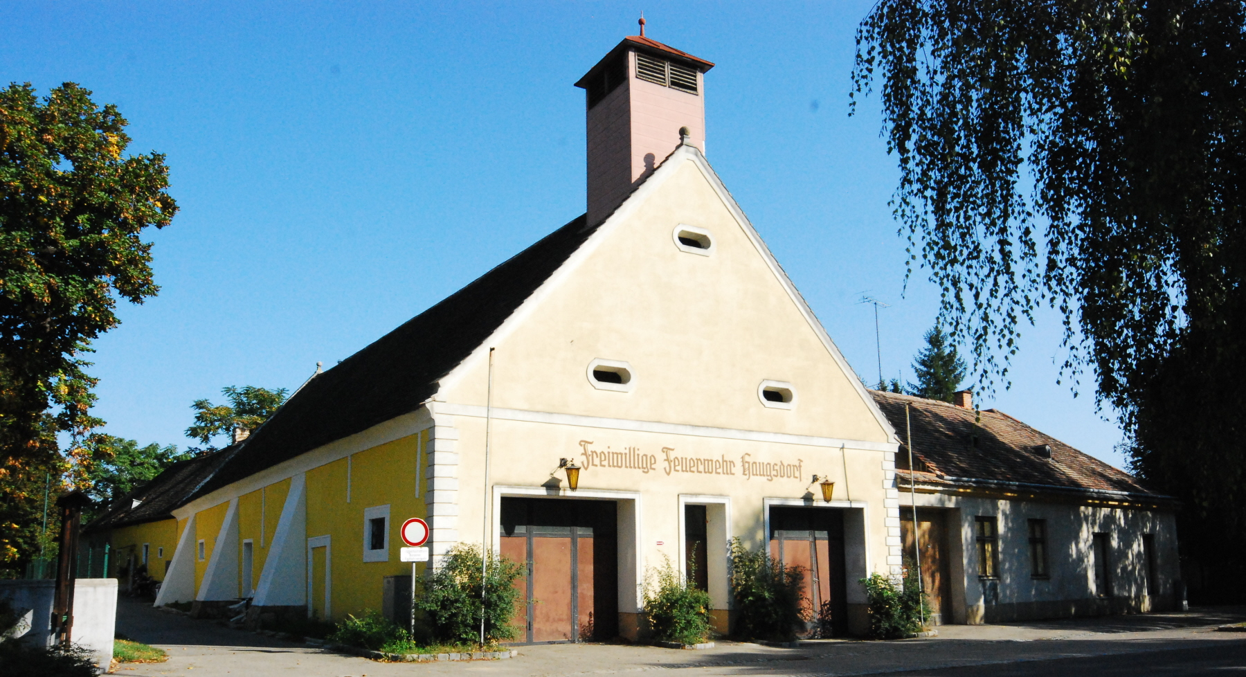 Feuerwehrgebäude